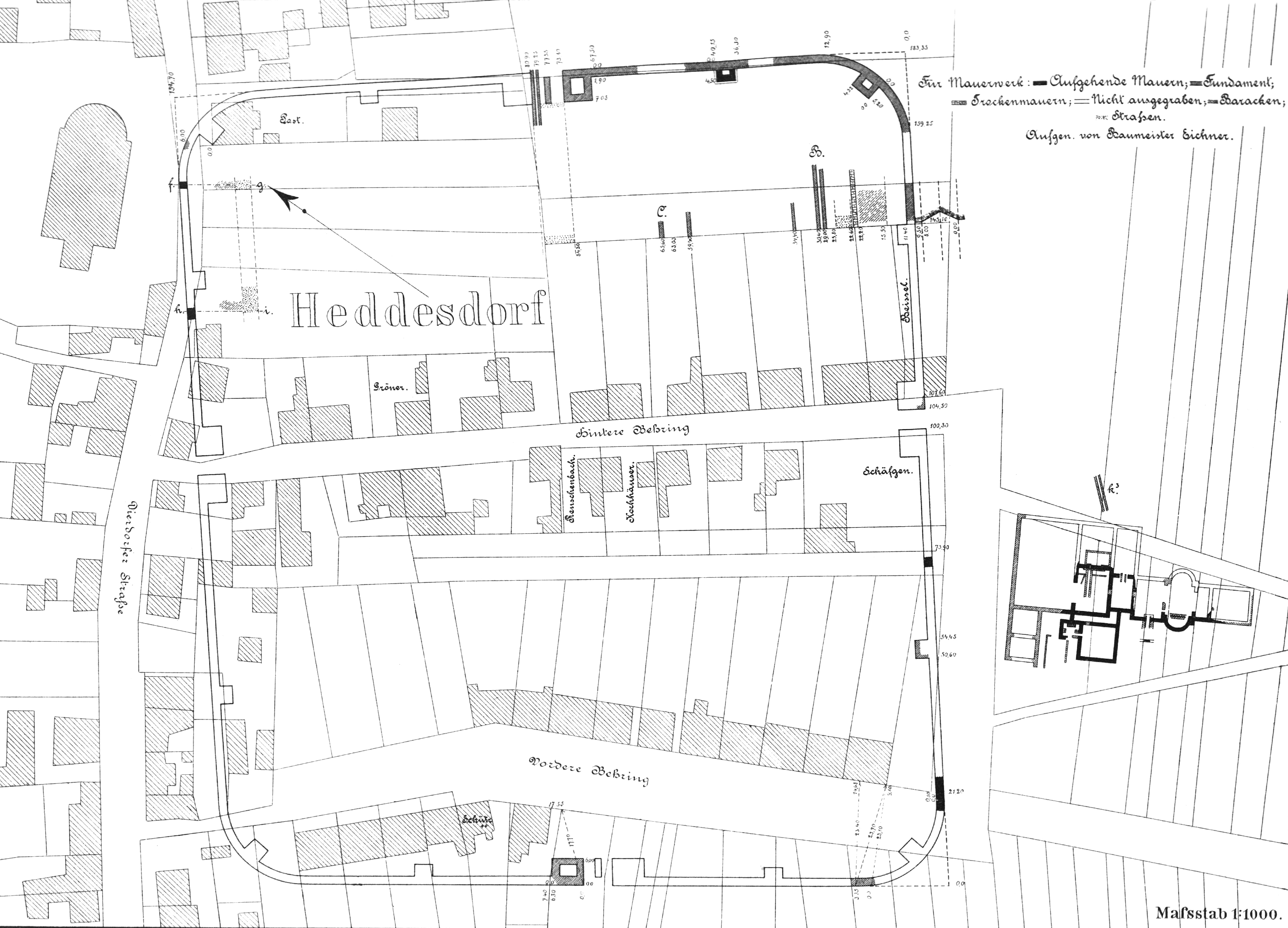 Grundriss des Kastells und des Kastellbades von Heddesdorf, ORL 1